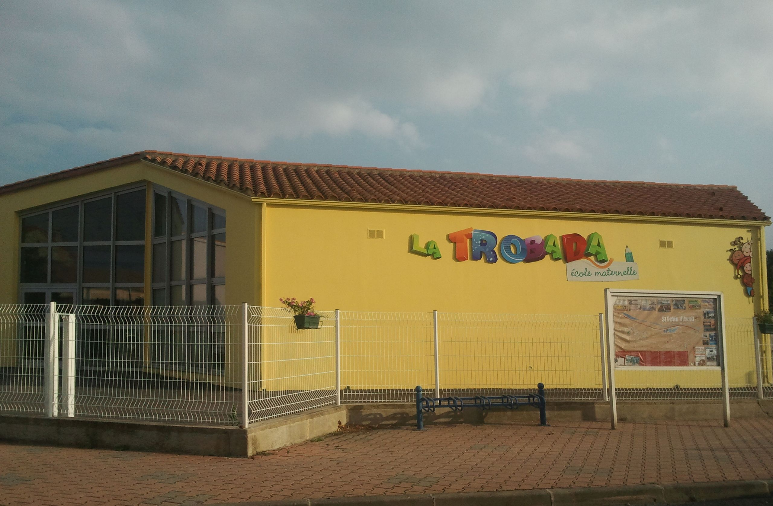 Ecole maternelle de Saint-Féliu-d'Avall